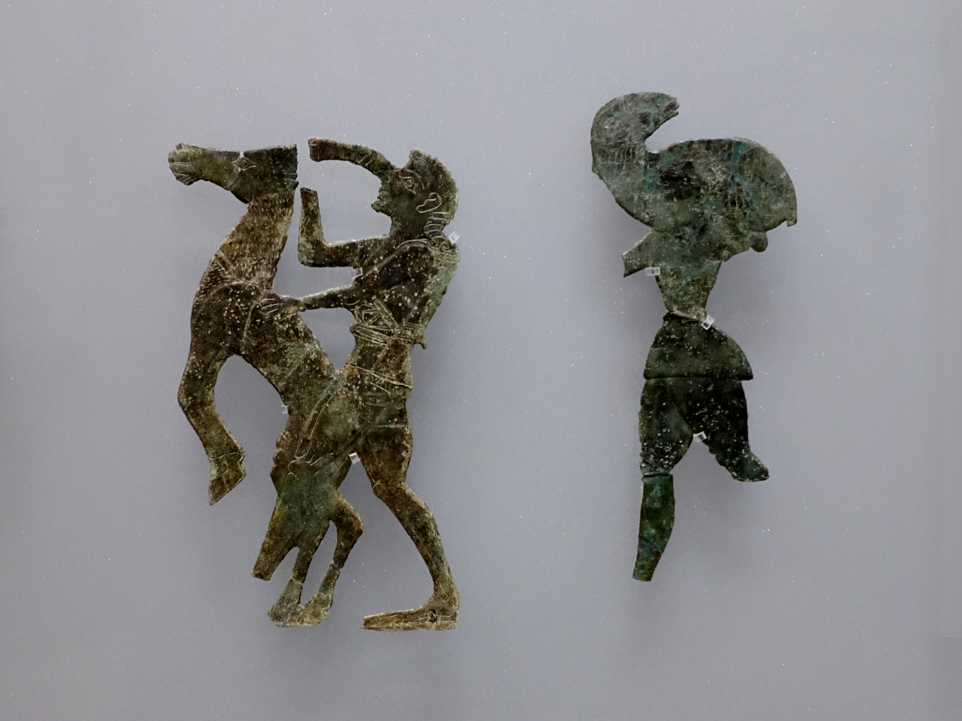 Durch Hämmern und Gravieren verzierte ausgeschnittene Bronzeplatten (Archaisch-Klassische Zeit, 7. bis Mitte des 5. Jahrhunderts v. Chr.), gefunden im Heiligtum des Hermes und der Aphrodite bei Symi, Archäologisches Museum von Iraklio, Kreta, Griechenland